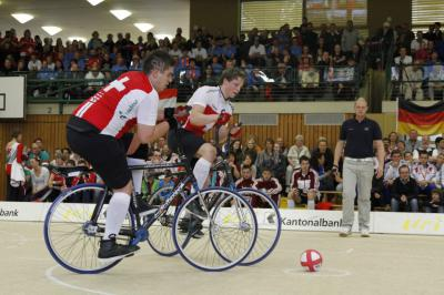 Thomas Stojan & Severin Zimmermann an der Radball Junioren Europameisterschaft 2013 in Altdorf UR vertreten die Schweiz.